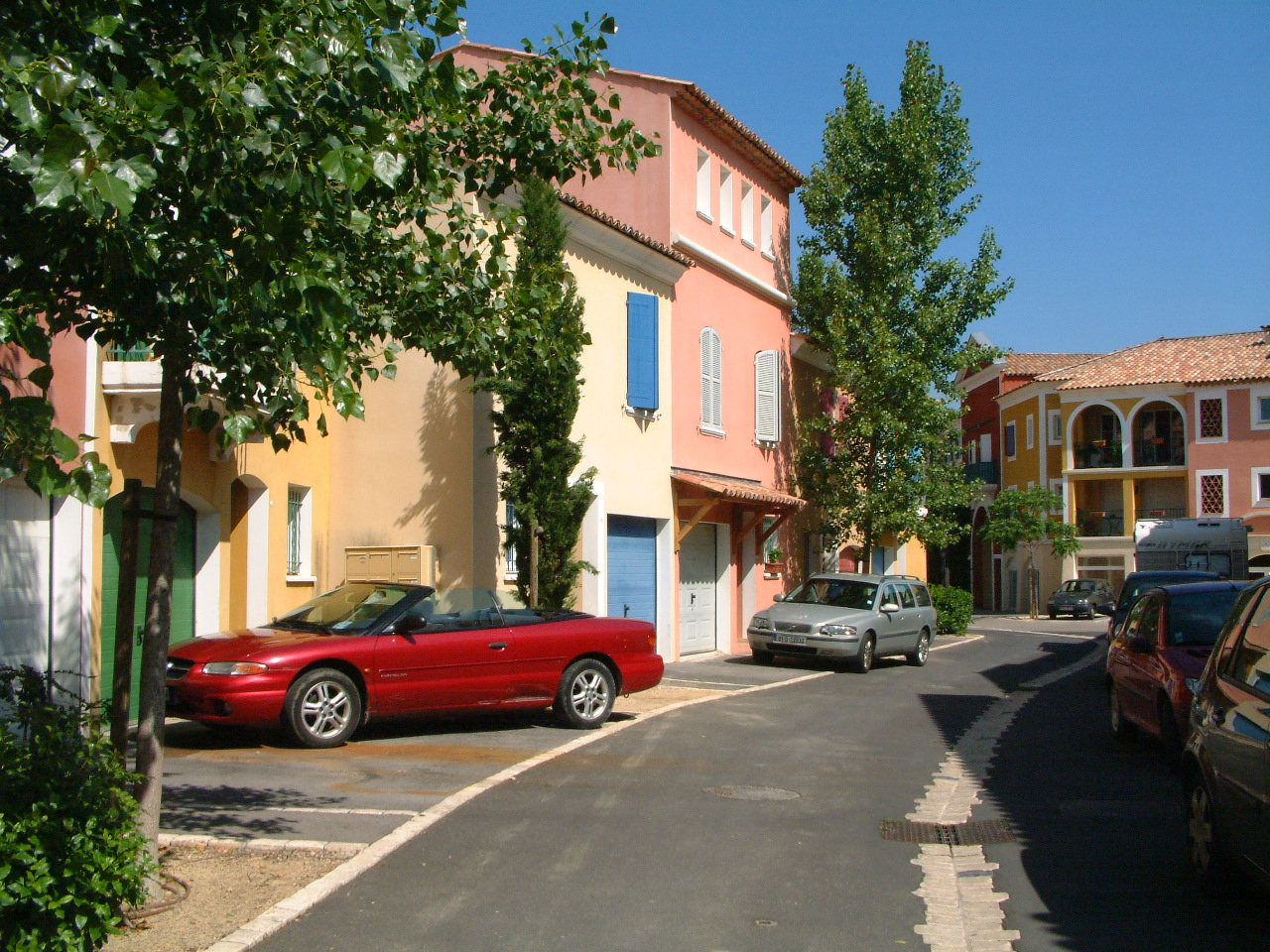 Rue du coeur de village